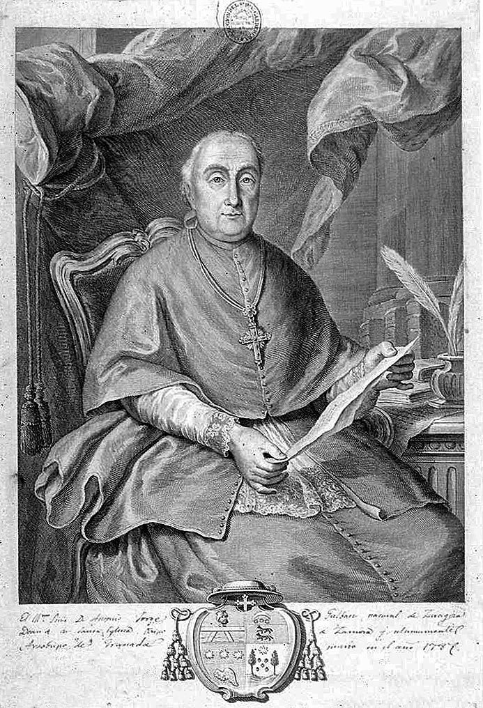 Retrato del arzobispo de Granada Antonio Jorge y Galván (1717-1787) grabado por Francisco Muntaner (1743-1805) sobre dibujo de Joaquín Inza y García (1736-1811); Biblioteca Nacional, Madrid